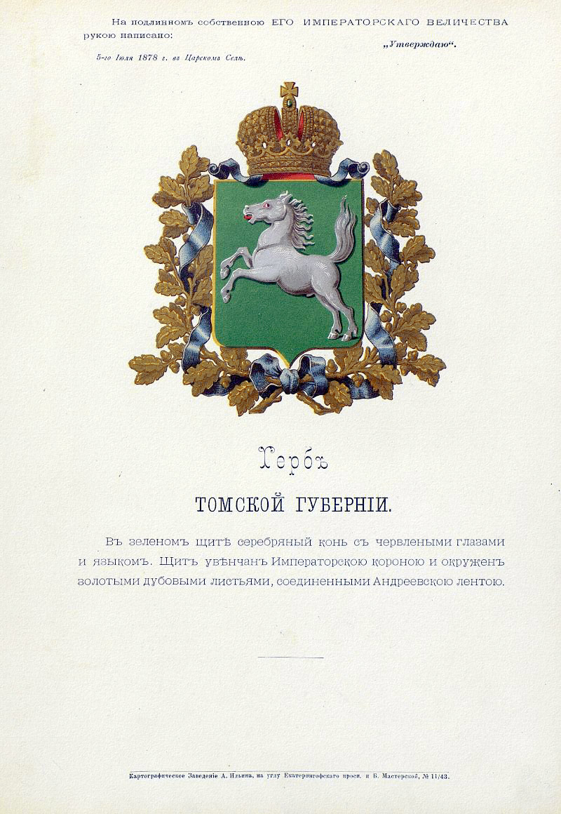 Official Russian Empire coat of arms Tomsk Governorate. Герб Российской Империи Томской губернии с официальным описанием в Гербовнике Бенке. Утверждён Императором Всероссийским Александром Вторым.